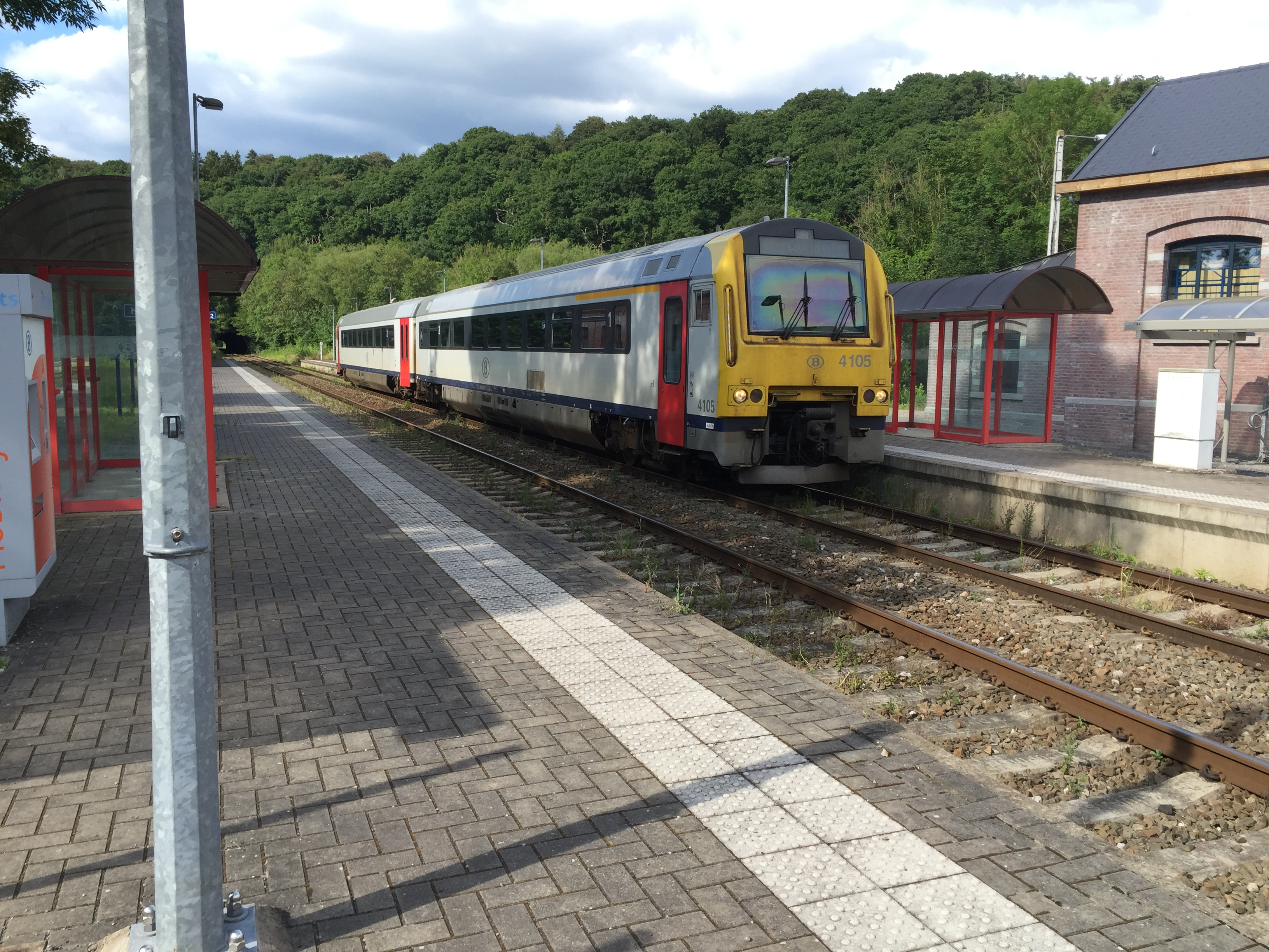 AR 41 en gare de Ham-sur-Heure